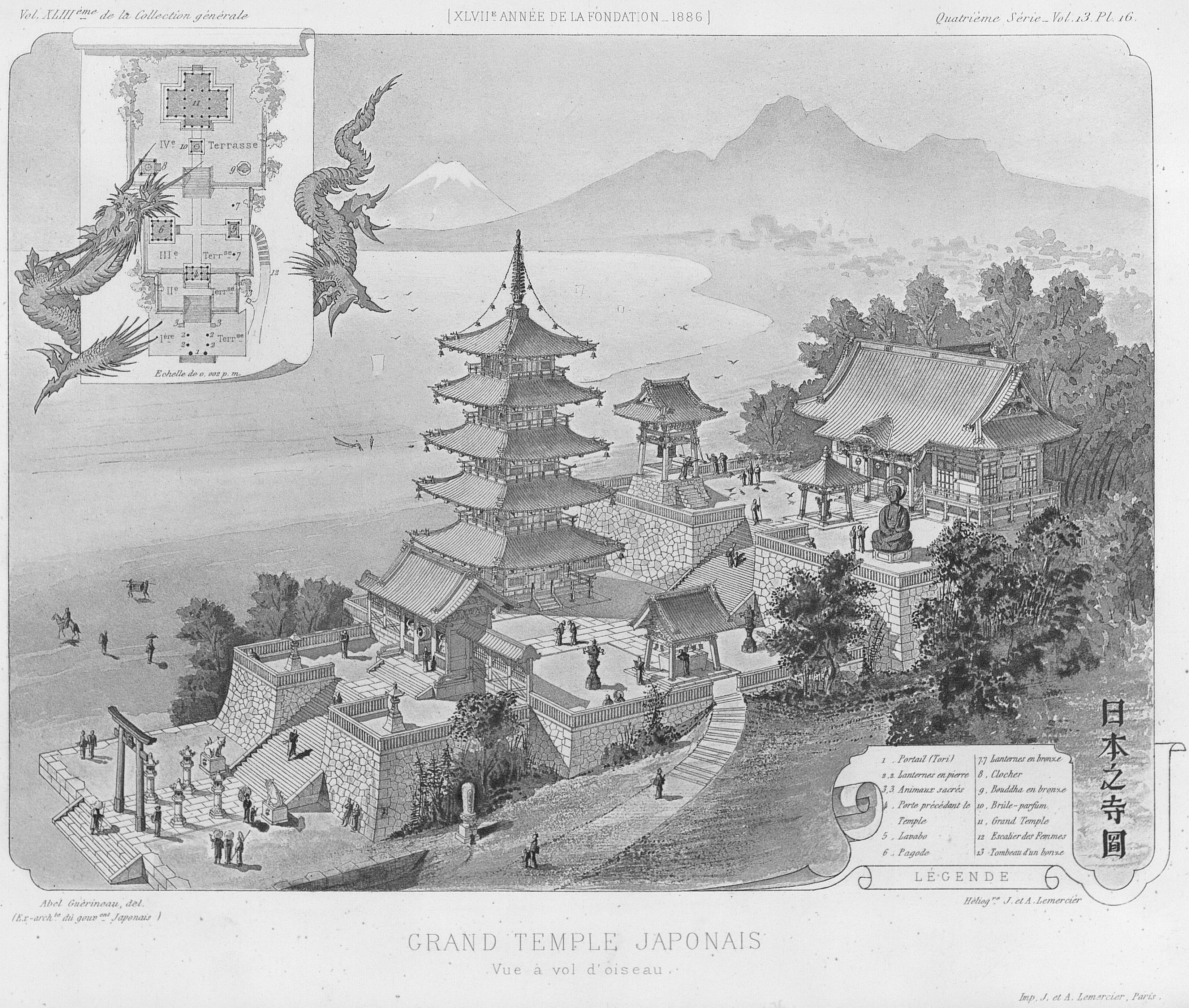 日本之寺圖